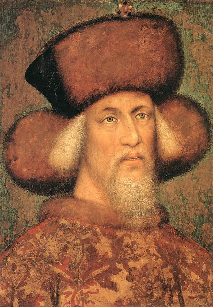 Abgebildete Person: Kaiser Sigismund I. Sohn des Karl IV. von Luxemburg